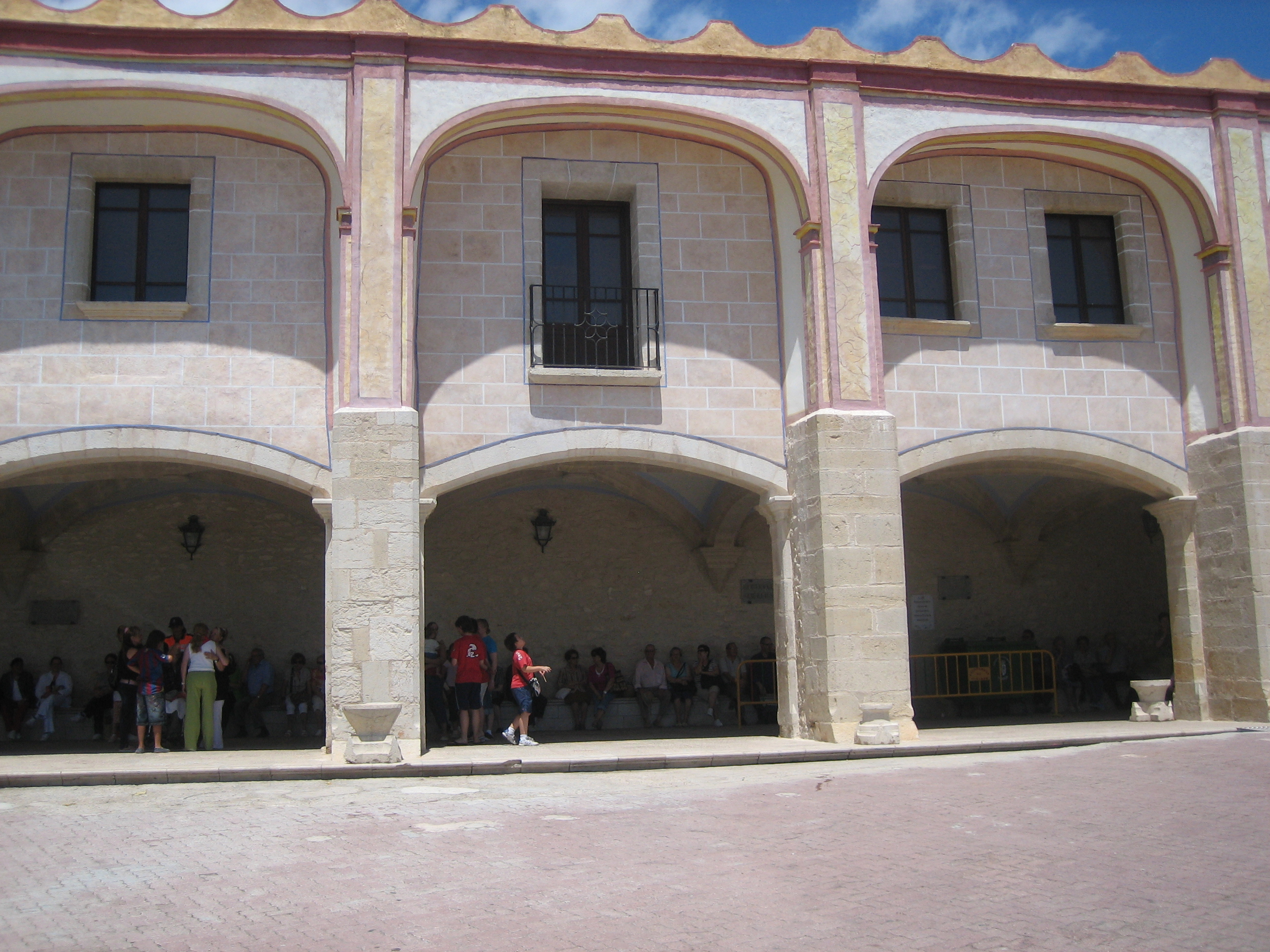 Hostatgeria de l'ermita de la Mare de Déu de la Misericòrdia i Sant Sabastià de Vinaròs (Baix Maestrat)